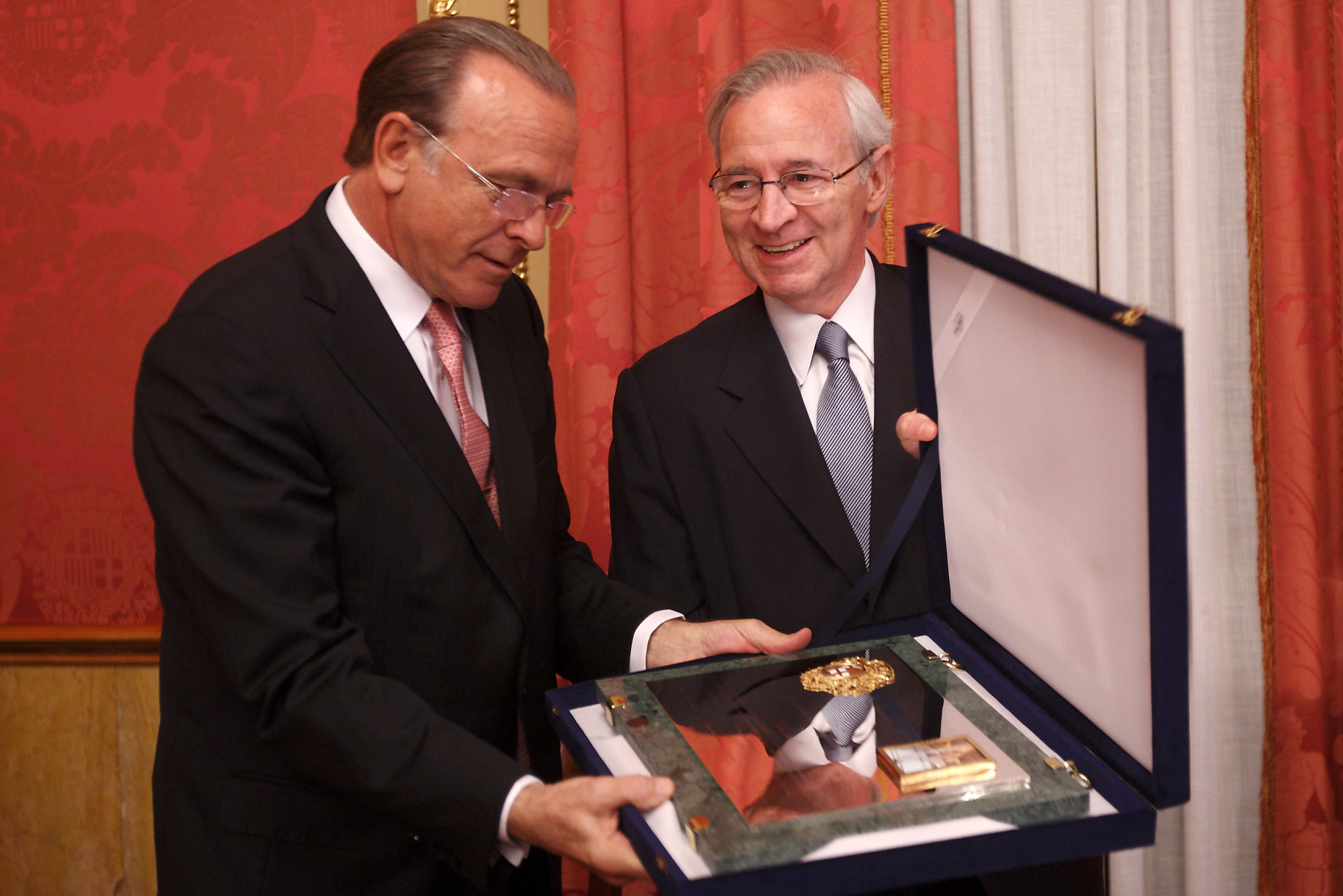 XLV Edició del Premi Llotja, 12 d'abril de 2010. El president de La Caixa, Isidre Fainé, recull el Premi Llotja a la millor informació de Societat Mercantils al mercat i als seus clients, de mans del president de la Cambra de Comerç de Barcelona, Miquel Valls.